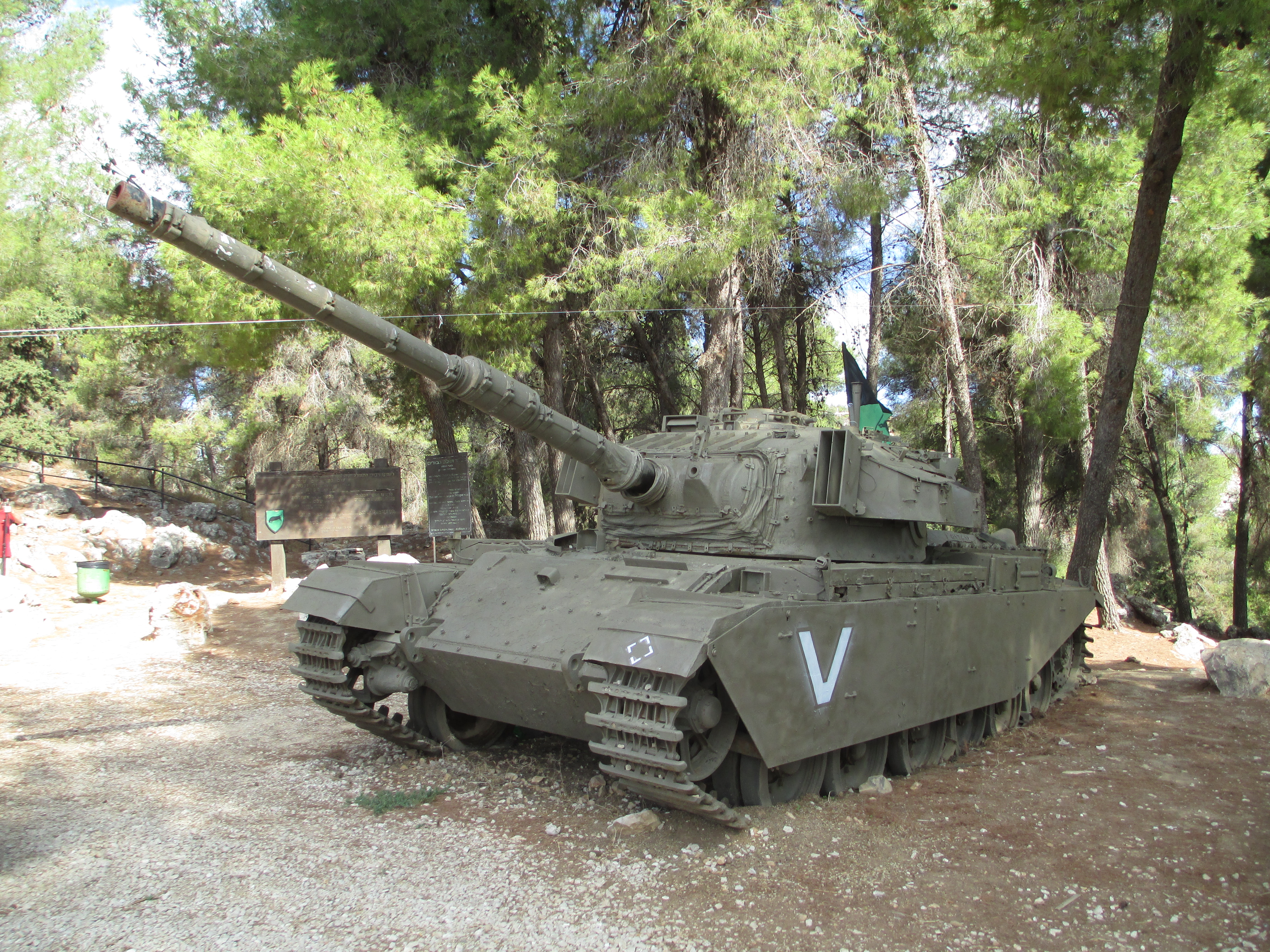 טנק צנטוריון בחניון אנדרטת חטיבה 37 ליד עין זיתים